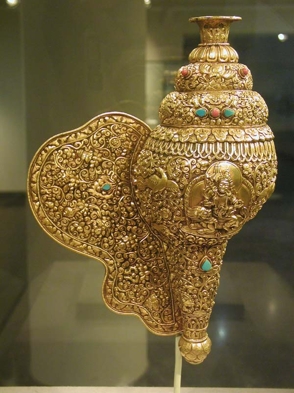 全包金zh:法螺 本文物为zh:清代zh:藏传佛教zh:法器，为zh:台湾zh:收藏家王度收藏。 zh:2004年7月展出于zh:北京大学zh:赛克勒考古与艺术博物馆，User:Mountainzh:2004年zh:7月28日拍摄。拍摄者已授权依照GFDL协议发布该图像。